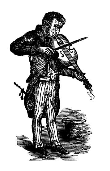 Wahrscheinlich handelt es sich hier um eine Abbildung des Bündner Musikers Johann Majoleth (1774-1856)